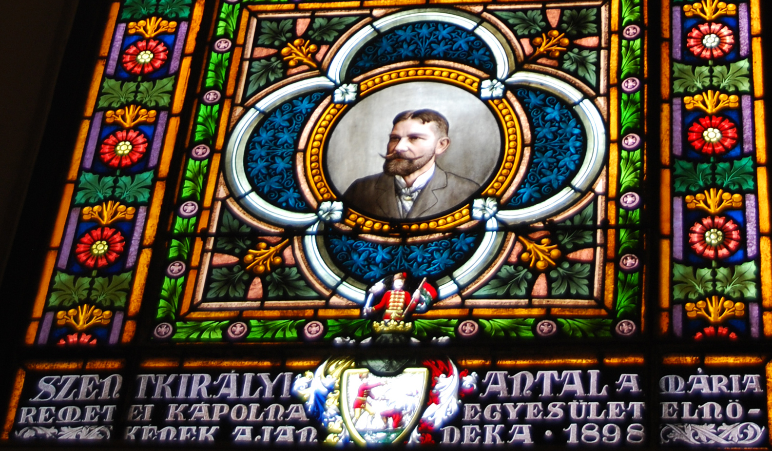 Róth Miksa üvegablaka a máriaremetei templomban Szentkirályi Antalról